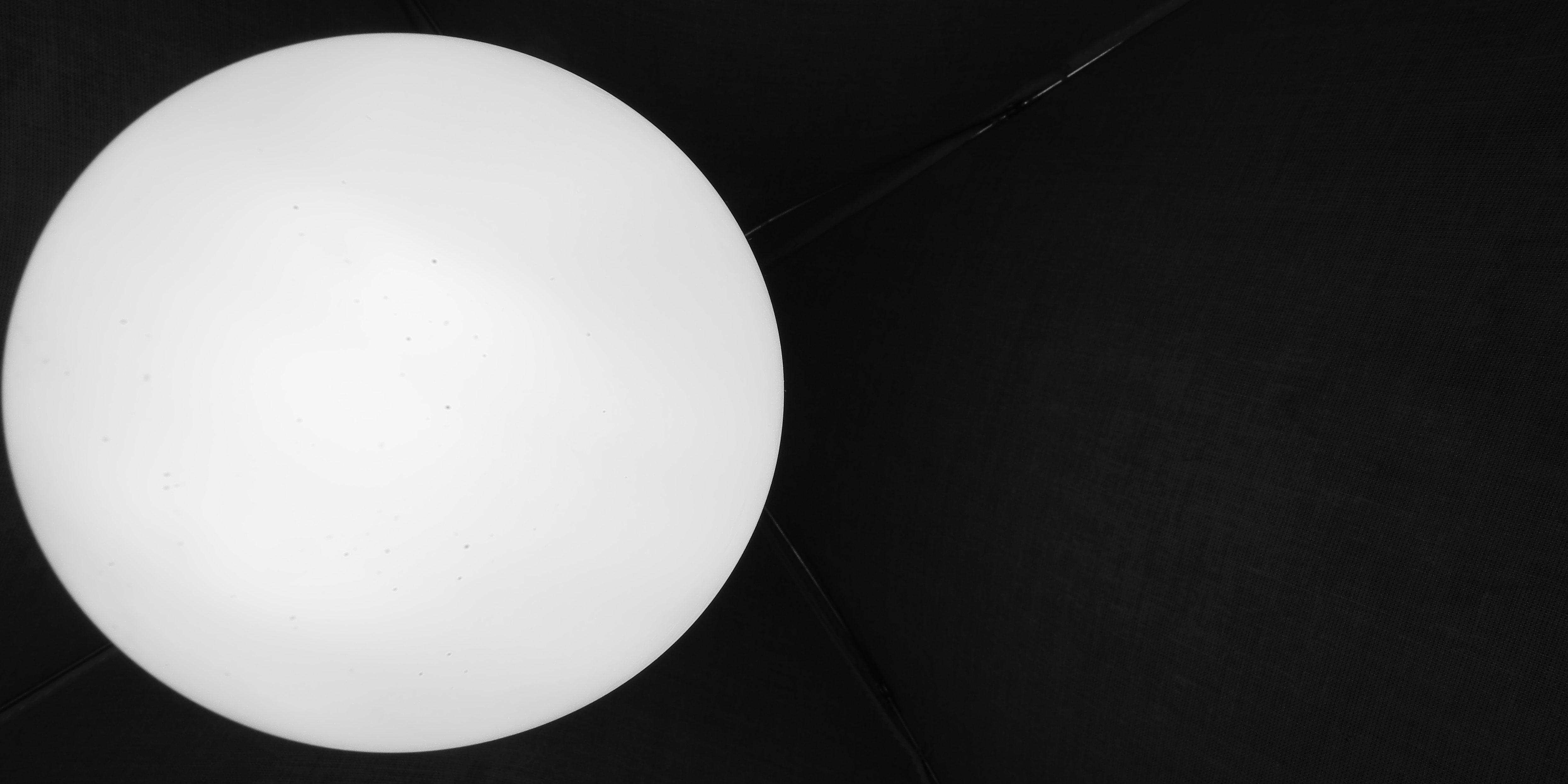 Geometrische Verzerrung an einem kugelförmigen Leuchtmittel mit einem Durchmesser von 90 Millimetern, das aus sehr kurzem Abstand (ebenfalls 90 Millimeter zur Objektebene durch die Kugelmitte) mit einem Ultraweitwinkelobjektiv weitgehend verzeichnungsfrei aufgenommen wurde. Der rechte Rand der Kugel ist in der Abbildung in der Bildmitte, der linke Rand der Kugel am linken Bildrand. Es ist wegen des Bildseitenverhältnisses von 2:1 deutlich zu erkennen, dass die Höhe der abgebildeten Kugel deutlich kleiner ist als die Breite.